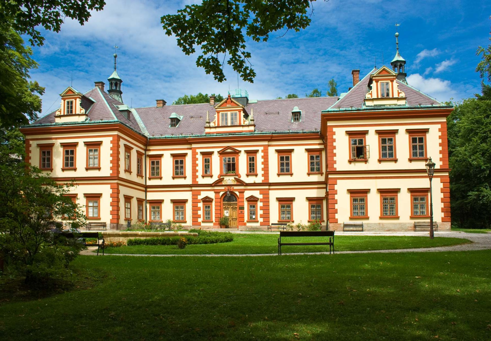 Zámek Jilemnice, Kostelní 75, Jilemnice